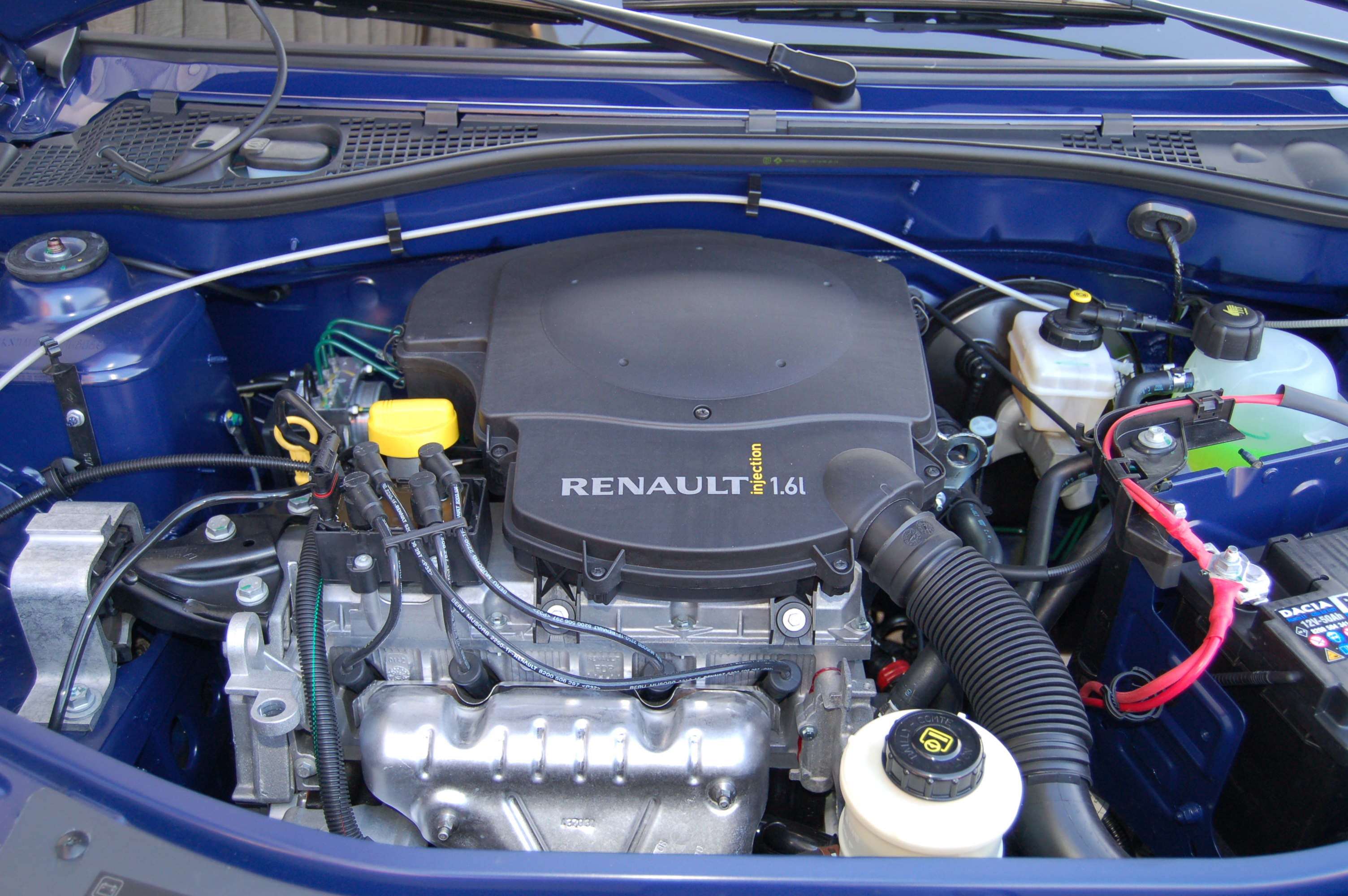 Ein Renault Ottomotor mit 1,6 Liter Hubraum im Dacia Logan MCV Lauréate, Modelljahr 2009.